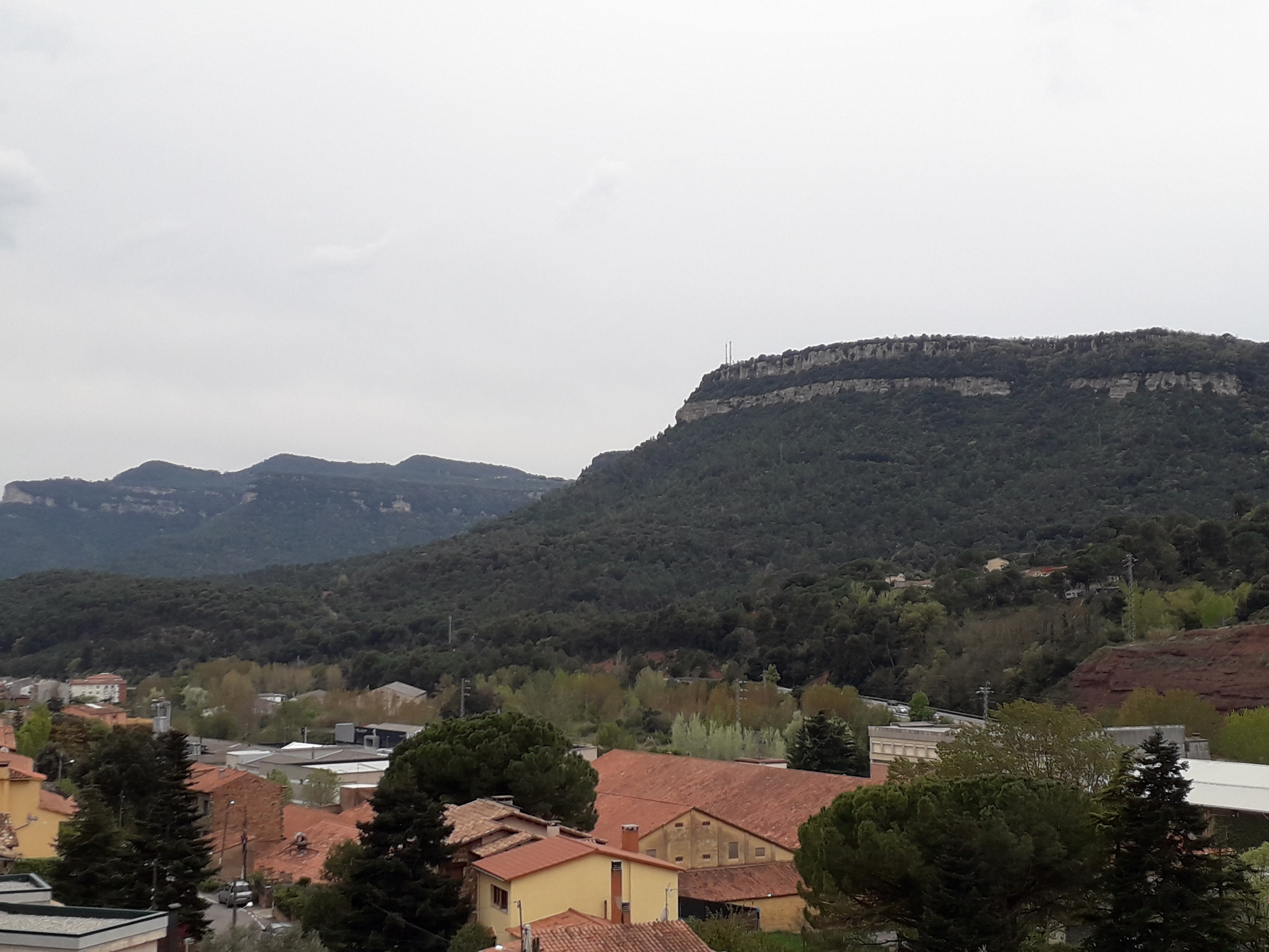 Cingles del Cerdà, des de la urbanització de la Font dels Enamorats